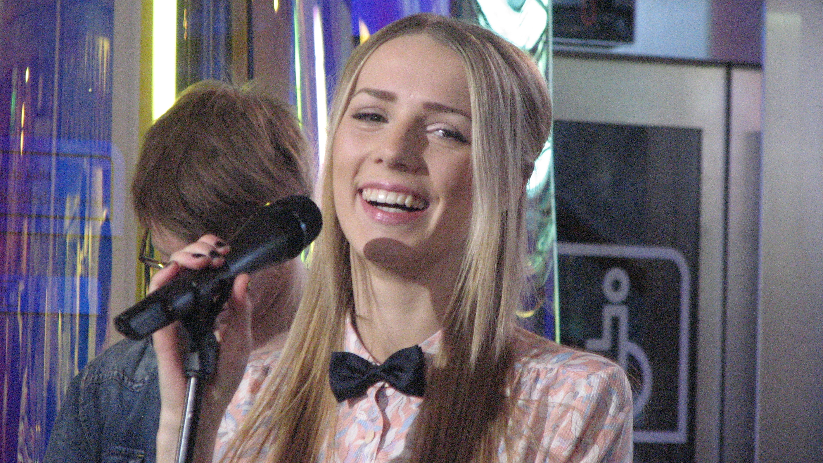 Liis Lemsalu Ringvaate Eesti Laulu salvestusel